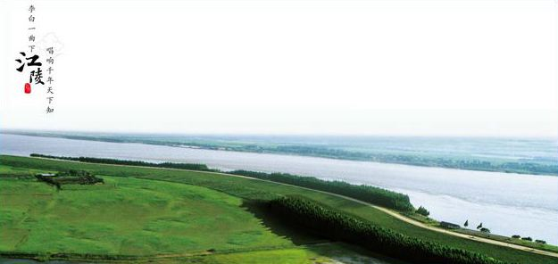 荆江 干堤